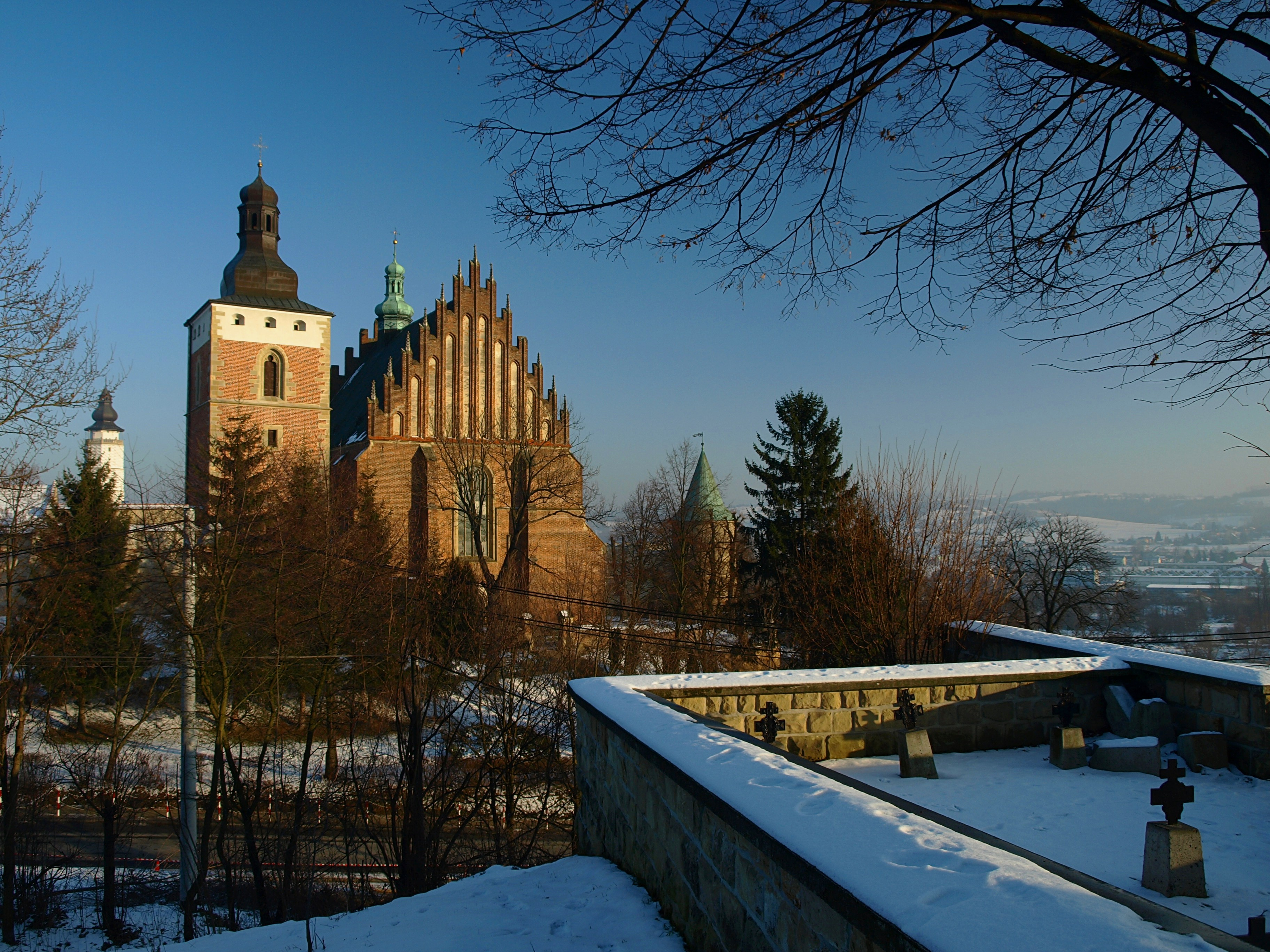 zespół kościoła farnego p.w. Bożego Ciała